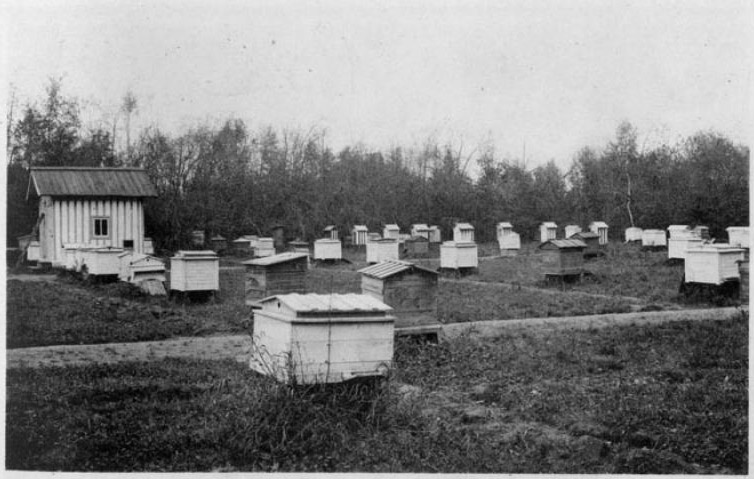 Улии учебной Пасеки МСХИ